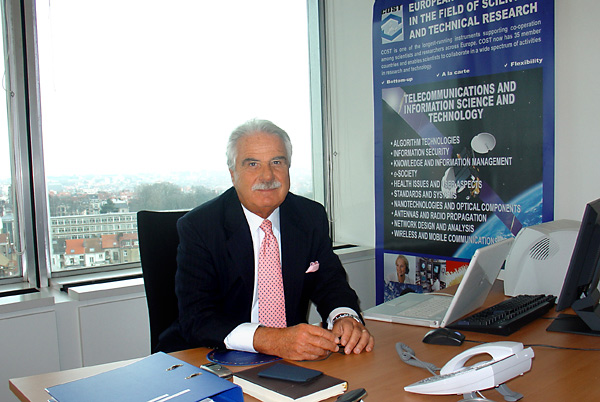 Presidente del COST pesso Bruxelles